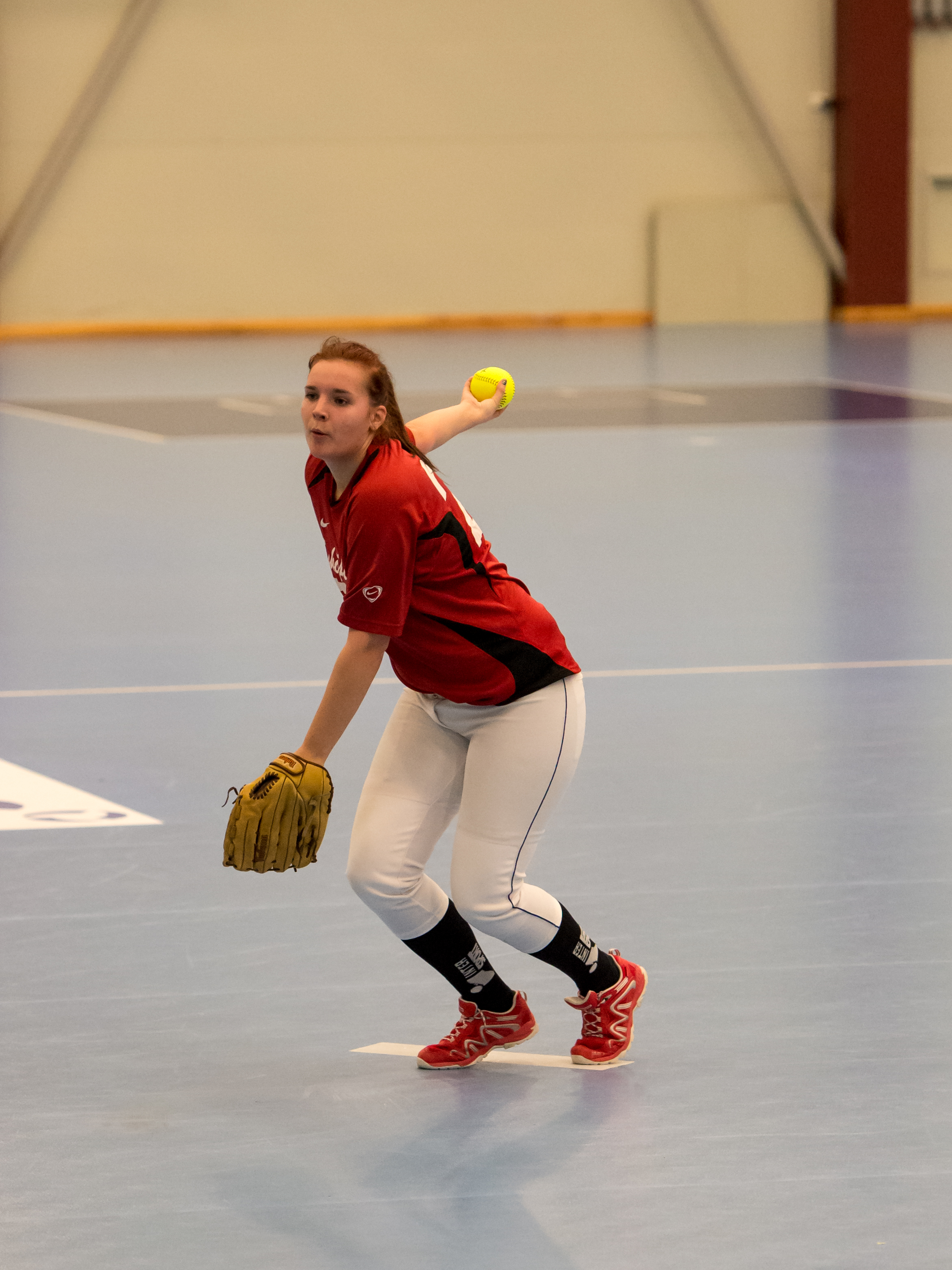 SM i softball, gruppspelsmatch mellan Leksand (i grönt) och Enköping (i rött) i Falu Kuriren Arena, Falun, Sverige.